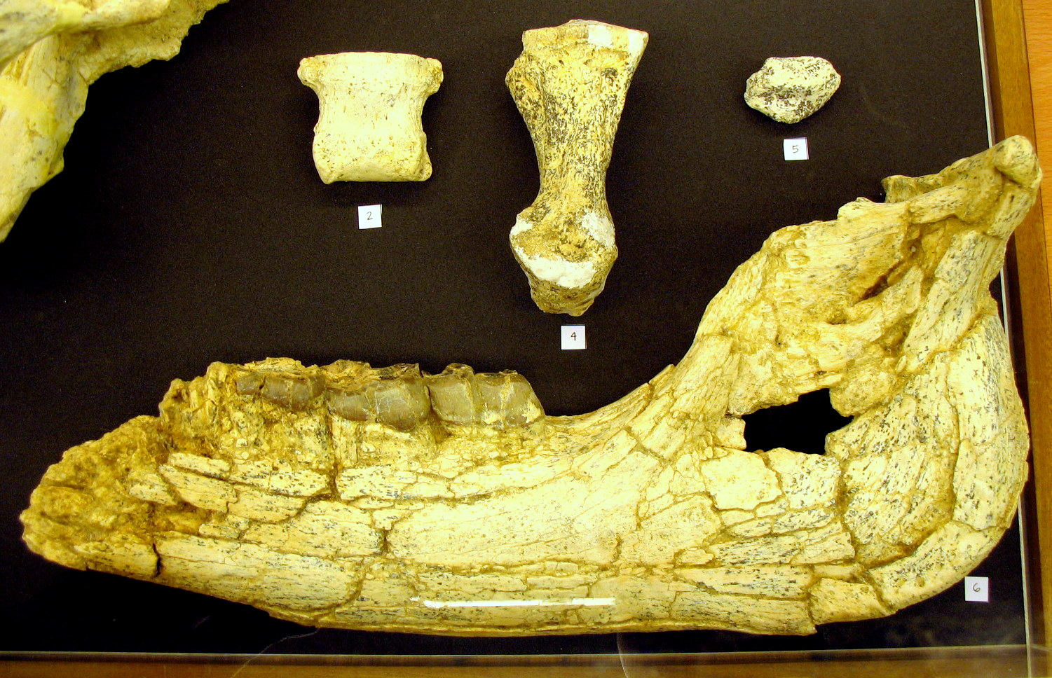 Mandíbula, falanges y metápodo (centro) de Prosantorhinus sp. del Yacimiento de Somosaguas (Madrid). Aragoniense Medio (Mioceno continental)